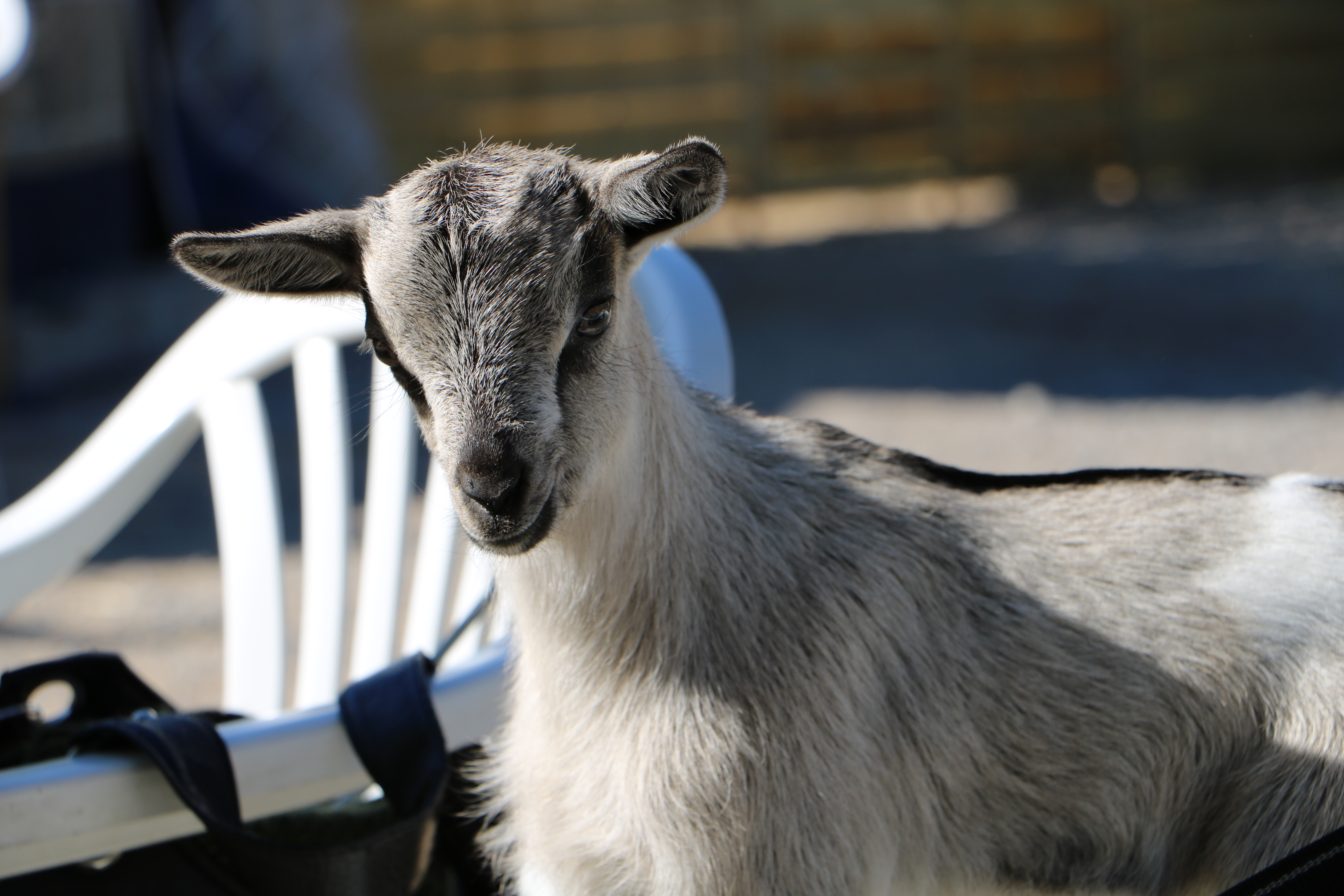 chevre naine à 15 jours